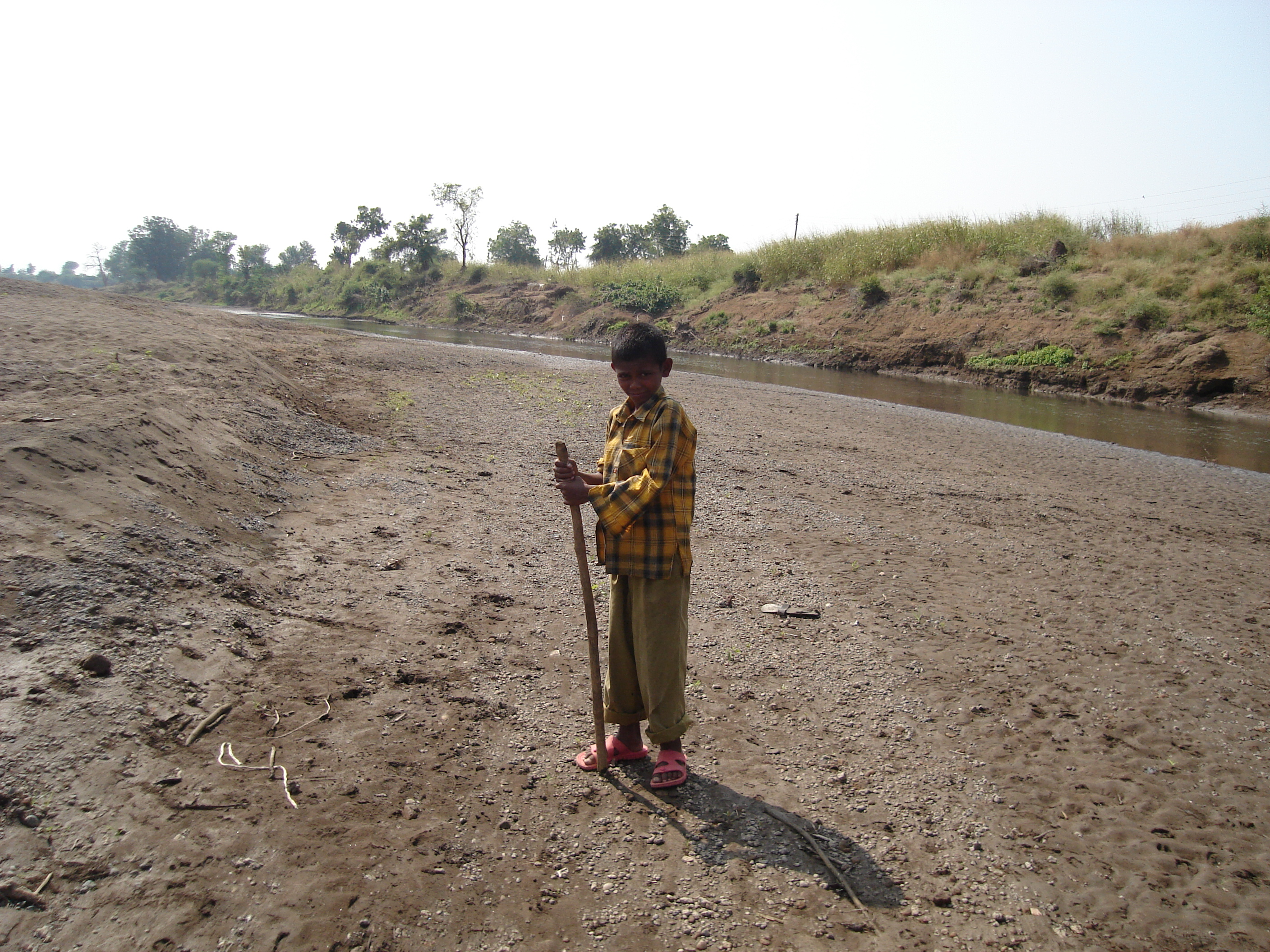 पारधी मुलगा